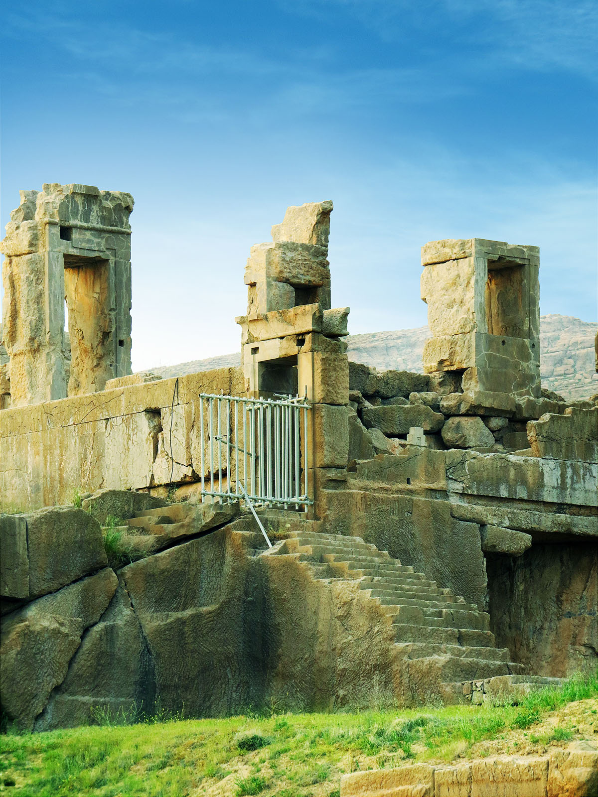 تخت جمشید- ضلع شرقی by: Masoud khalife